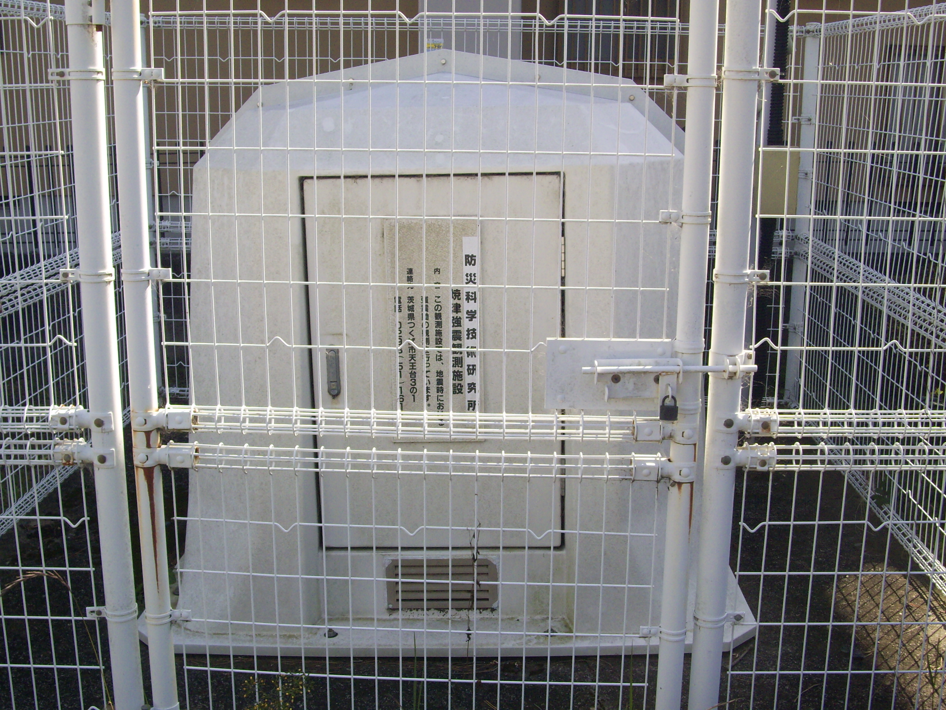 防災科学技術研究所が運用する全国強震観測網(K-net)の焼津にある観測点。ここで観測された地震情報は東海道新幹線の緊急停止用にも使われている。 ㊟カメラを起動すると日付機能が出荷時のものに初期化されるため、ファイル履歴の投稿日時とメタデータの原画像データの生成日時が異なります（本概要欄の下記日付が撮影日）